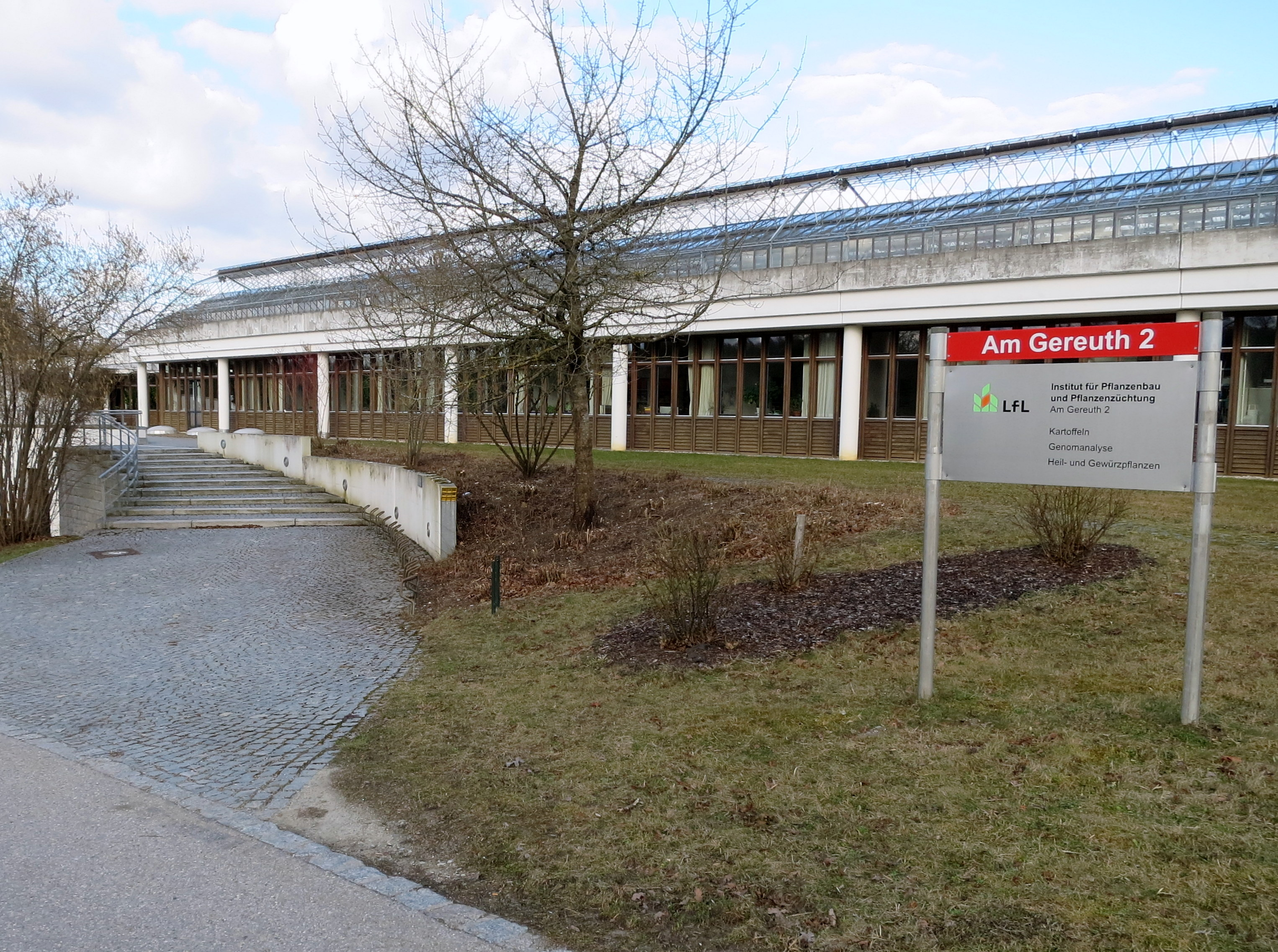 Im Nordteil des Campus Freising-Weihenstephan liegen die Gebäude der LfL